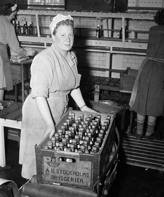 Åsögatan 113-119. S:t Eriks bryggeri (f.d. Neumüllers Bryggeri). En bryggeriarbeterska med en back jubileumsöl